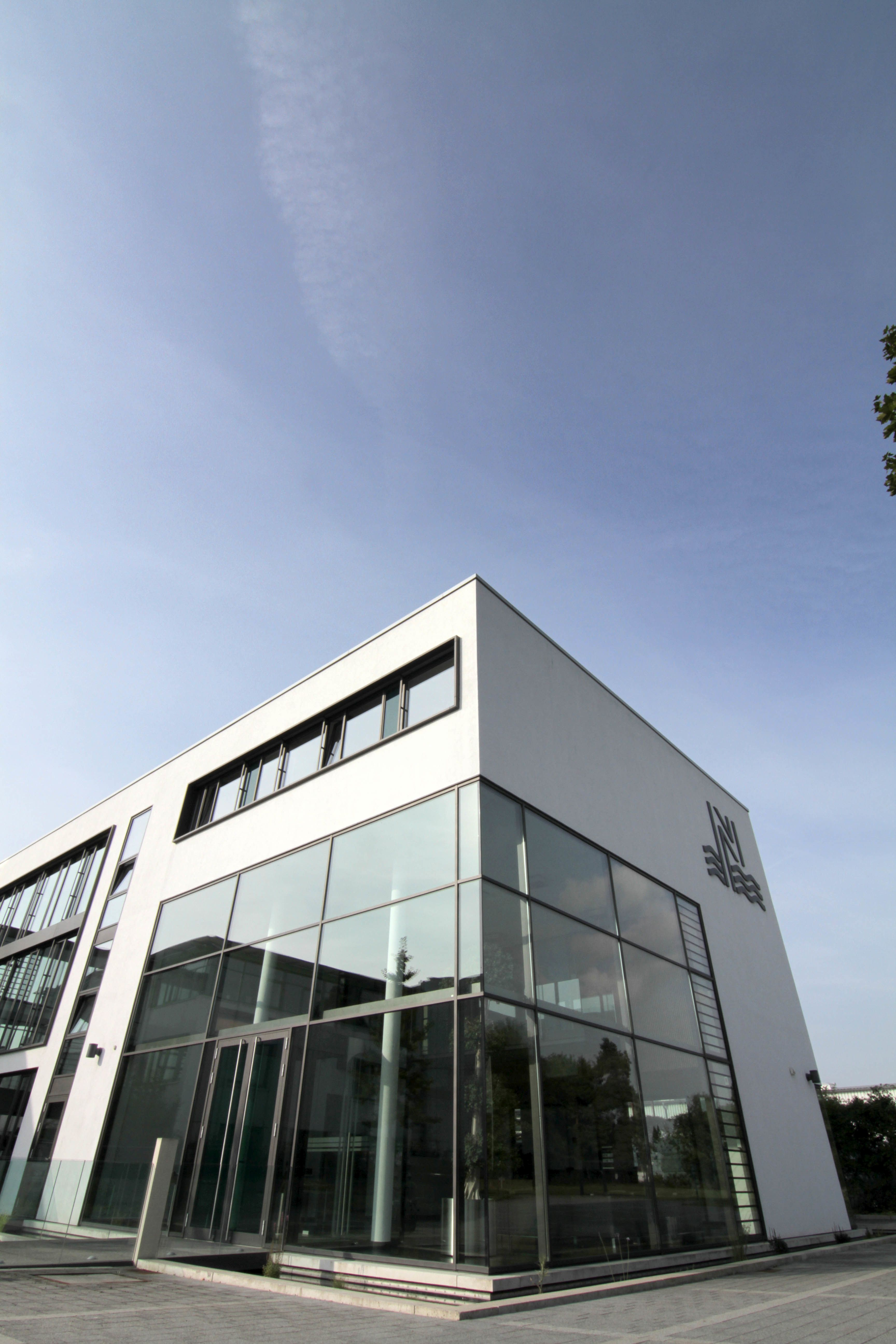 NAUE GmbH & Co. KG Haupsitz in Espelkamp